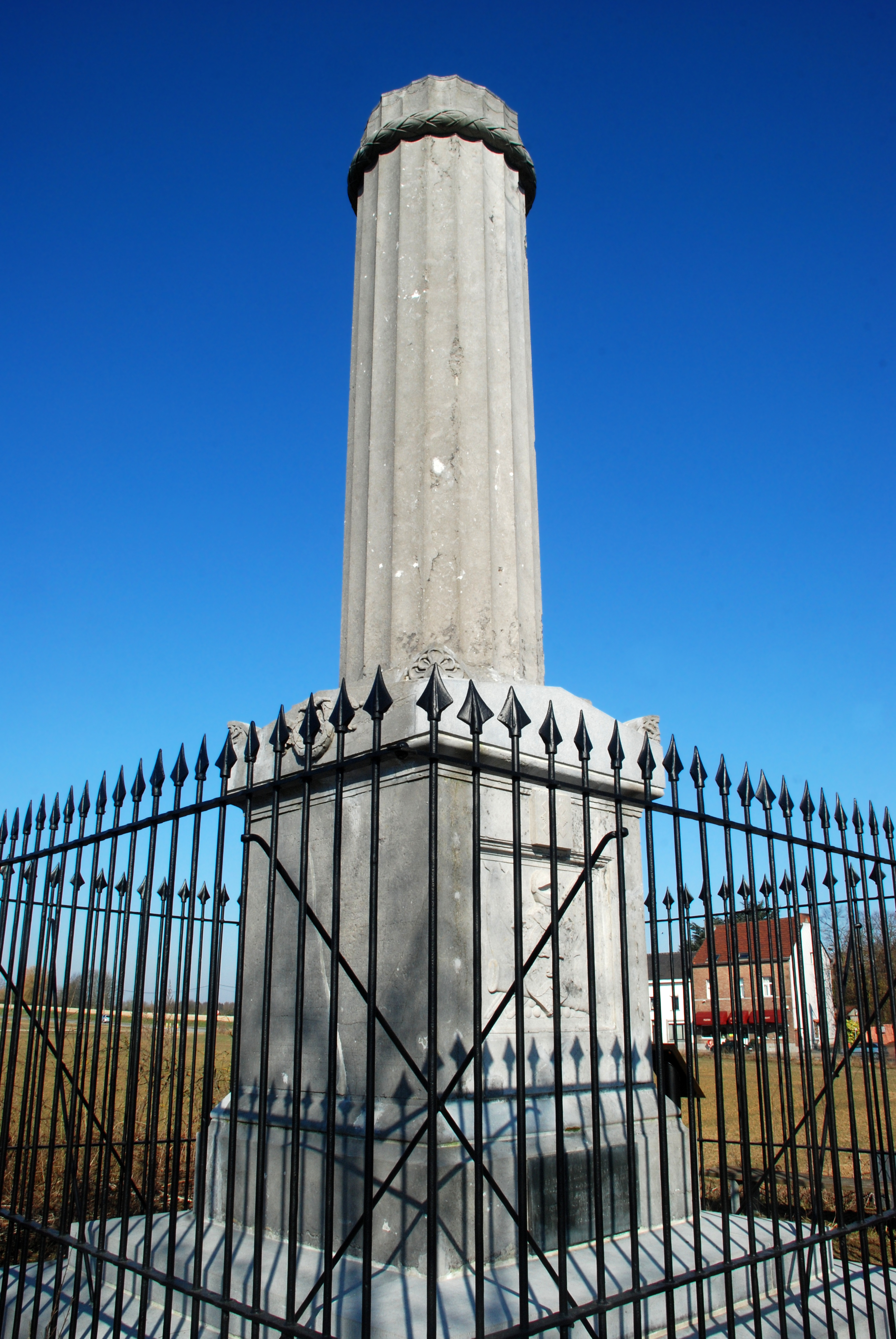 Belgique - Brabant wallon - Monument Gordon